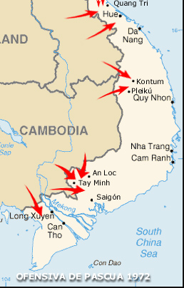 Ofensiva de Pascua | Pascua Attat 1972 Mapar realizado a partir del aparecido en la colección Nam, Crónica de la Guerra de Vietnam Autor: Zósimo 1/09/2006